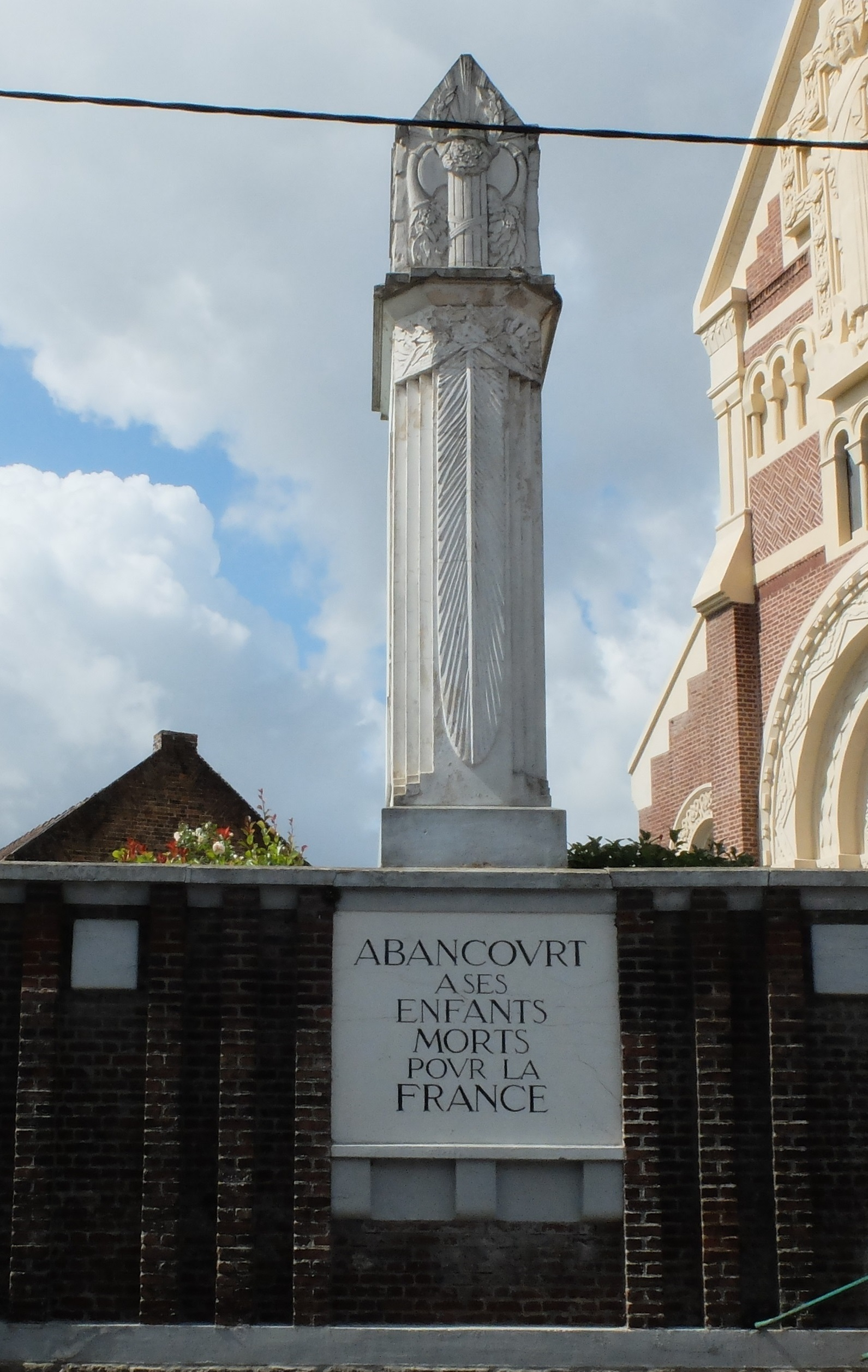 Vue du monument aux morts d'Abancourt (Nord).